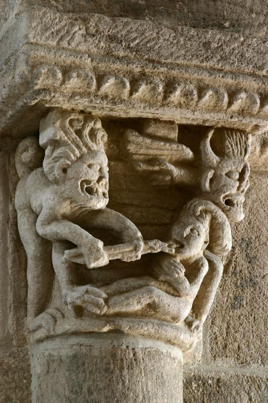 Chapiteau historié de l'église de Bois-Sainte-Marie